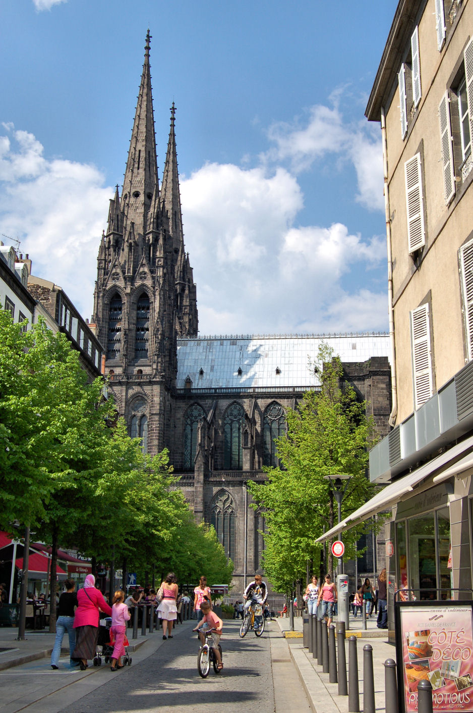 La place de la Victoire et la Cathédrale (Clermont-Ferrand, France)